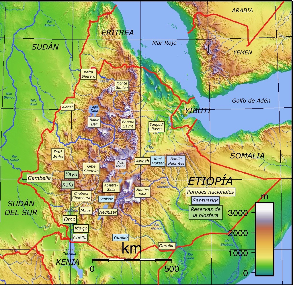 Áreas protegidas de Etiopía más importantes